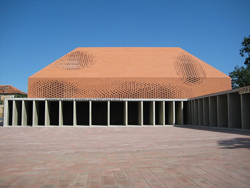 Pastoralni centar na Trsatu